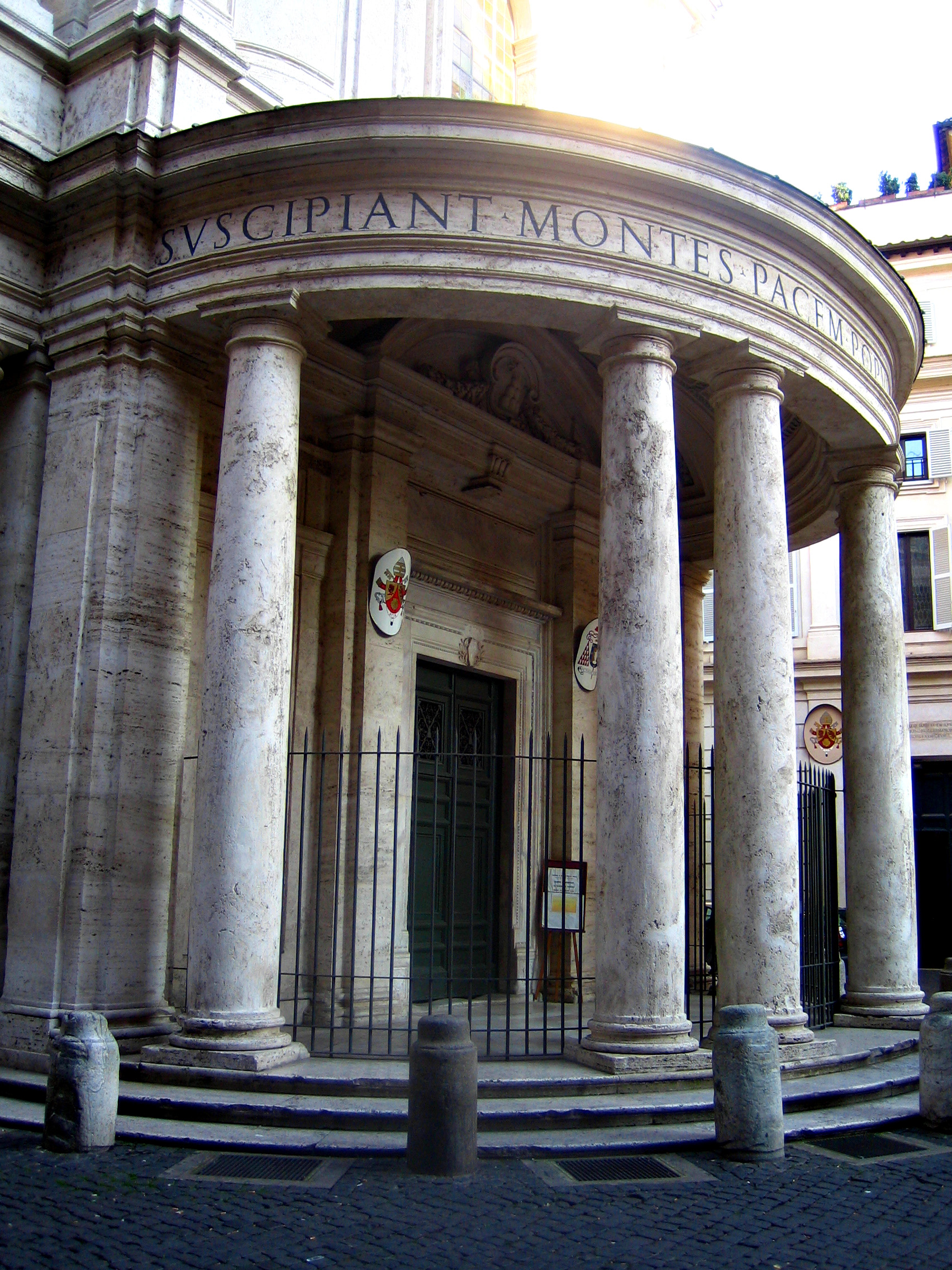 Santa Maria della Pace, Roma, Italia